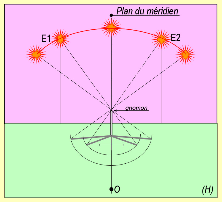 Détermination d'une ligne méridienne : méthode des ombres solaires égales.